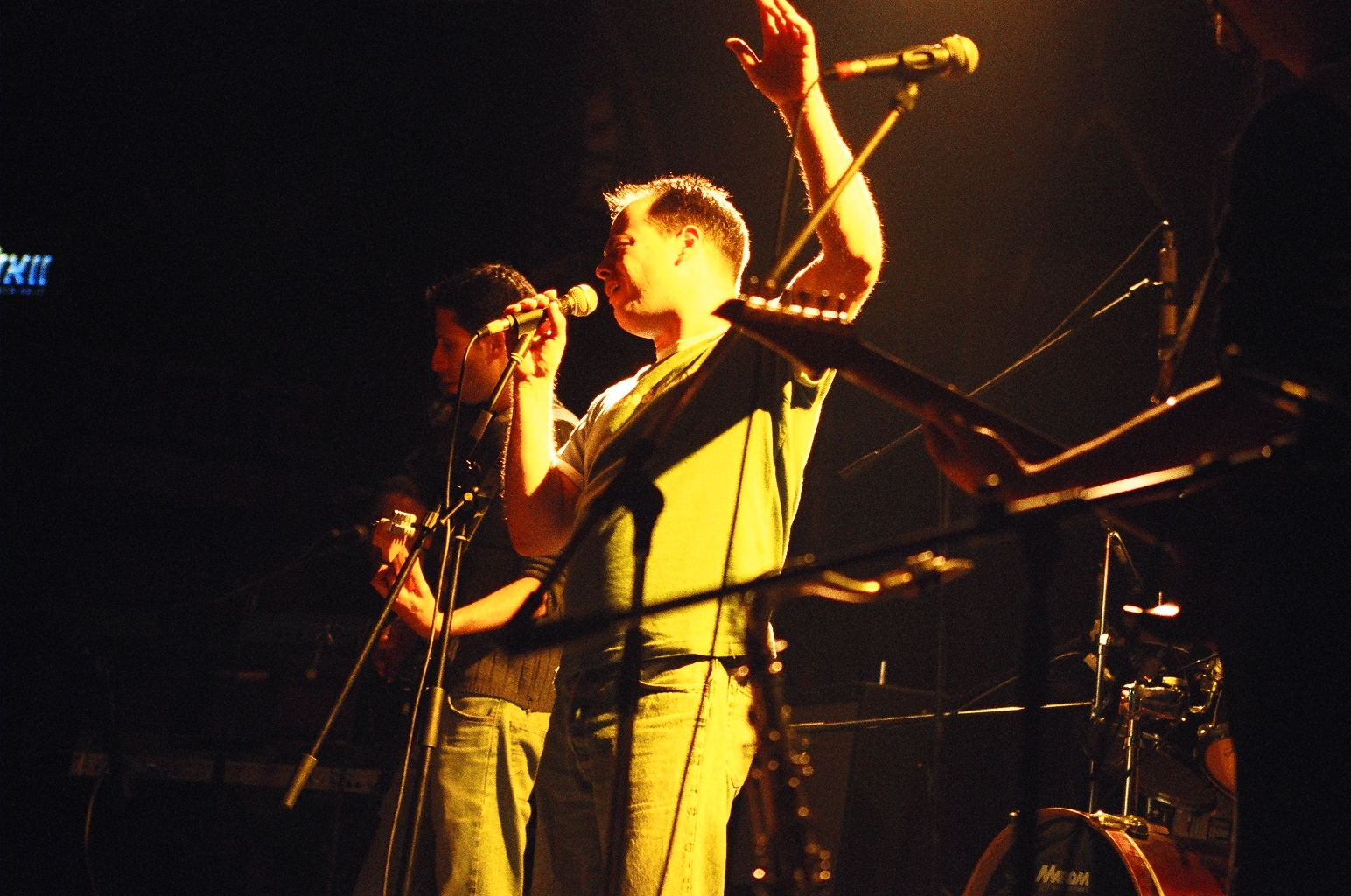 ADAM נוצר על ידי משתמש:קובי ריכטר